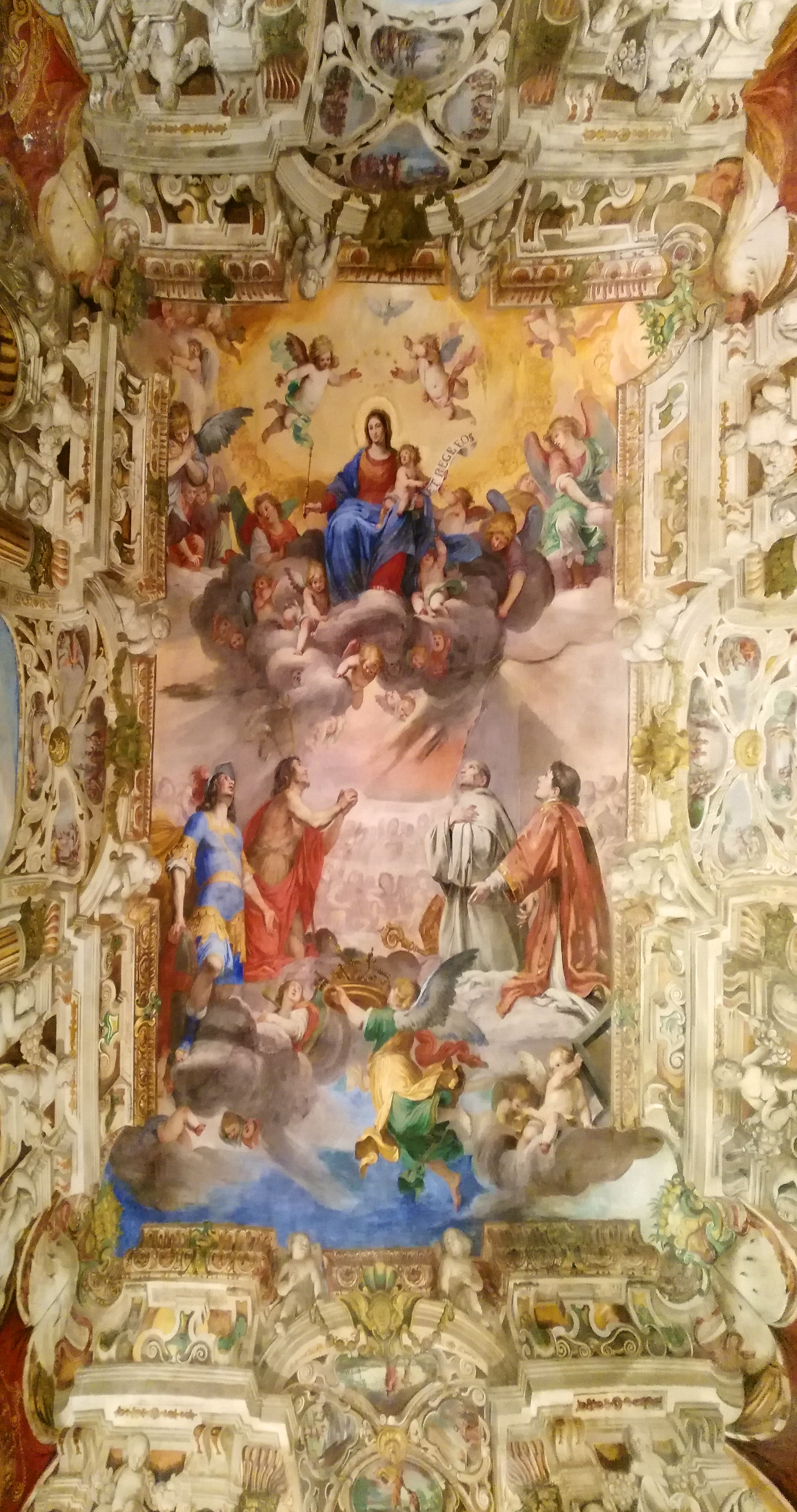 Palazzo Ducale This is a photo of a monument which is part of cultural heritage of Italy.